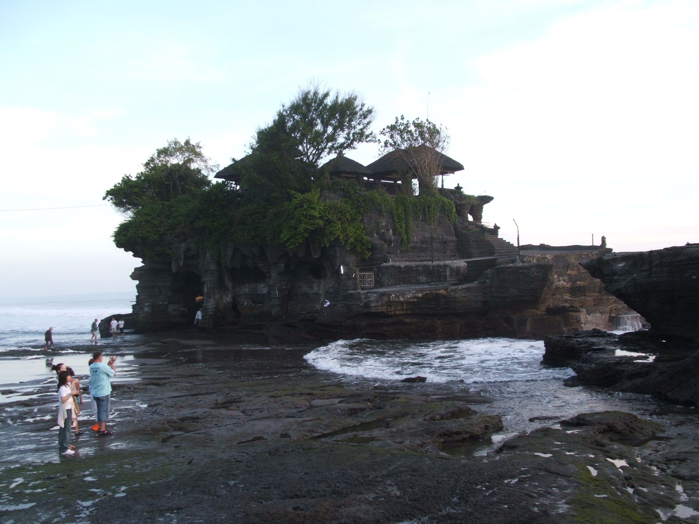 Pura Tanah Lot, Bali, at Low Tide